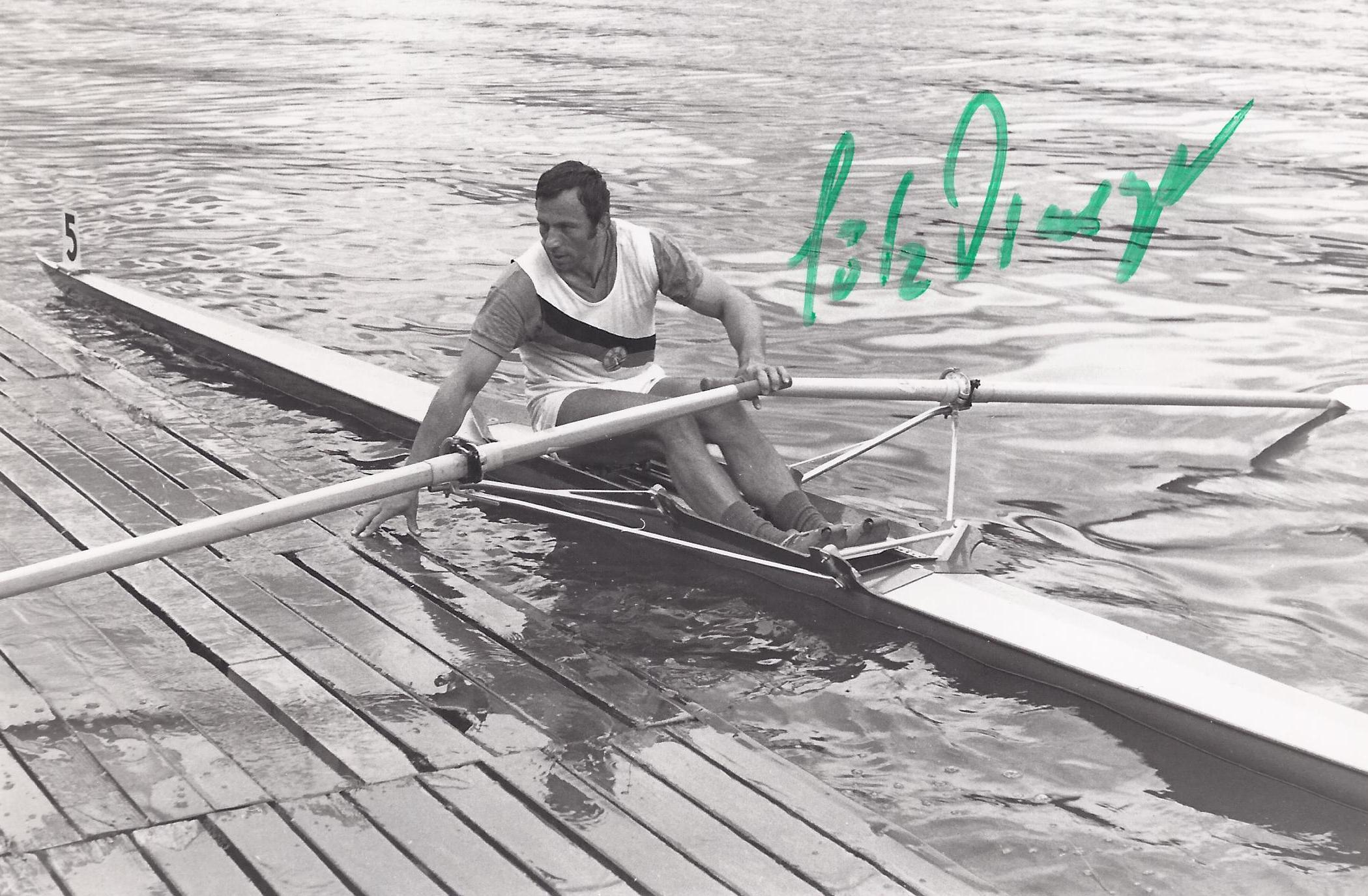 Götz Draeger nach dem Sieg auf der Rotsee-Regatta 1970 in Luzern